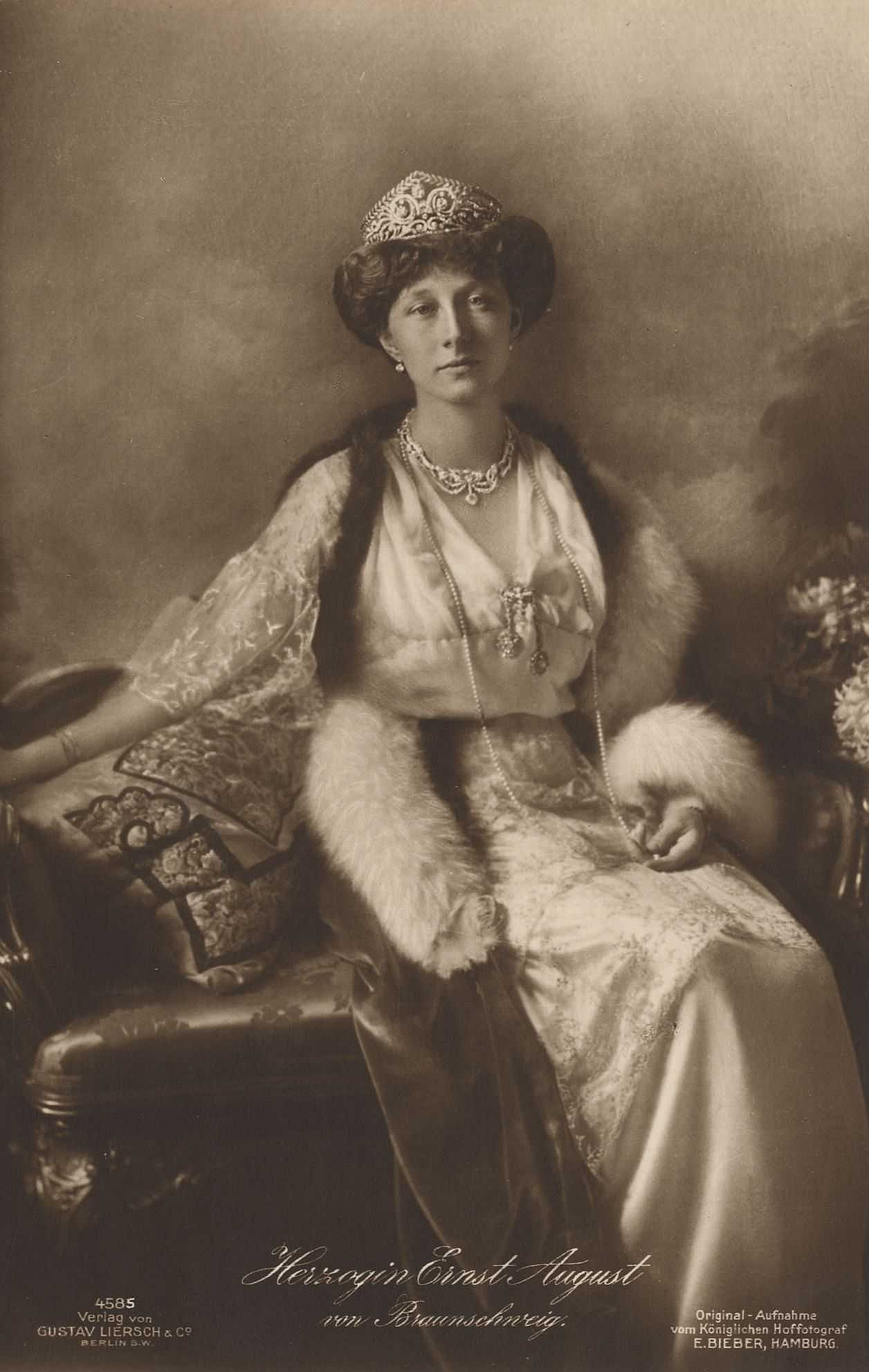 Victoria Luise, Herzogin Ernst August von Braunschweig-Lüneburg.